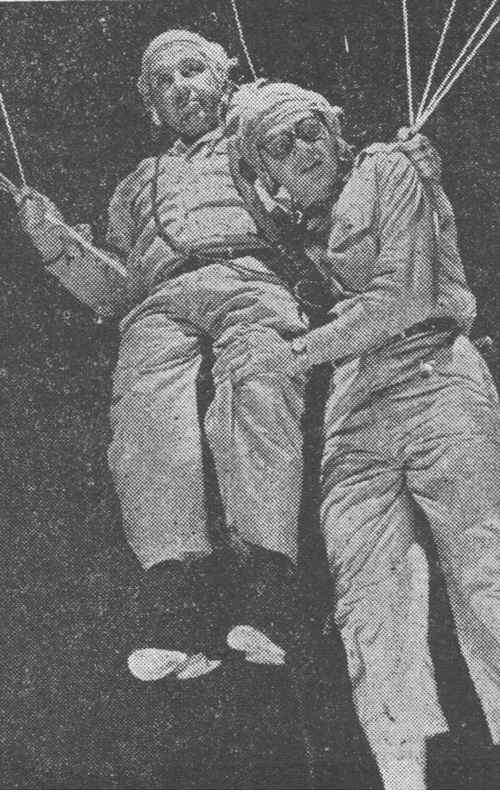 בומבה צור בהצגה "אני והסרג'נט" (1957)